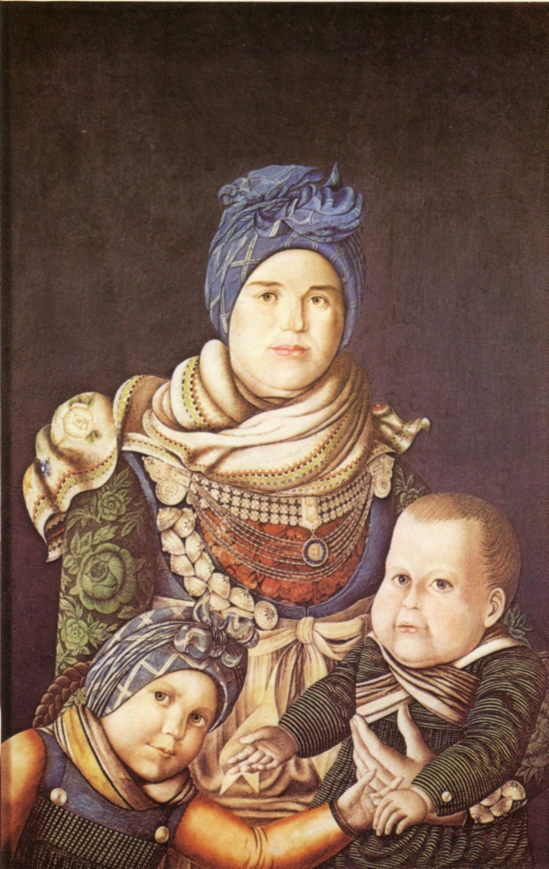 Oluf Braren - Ing Peter Matzen mit Kindern